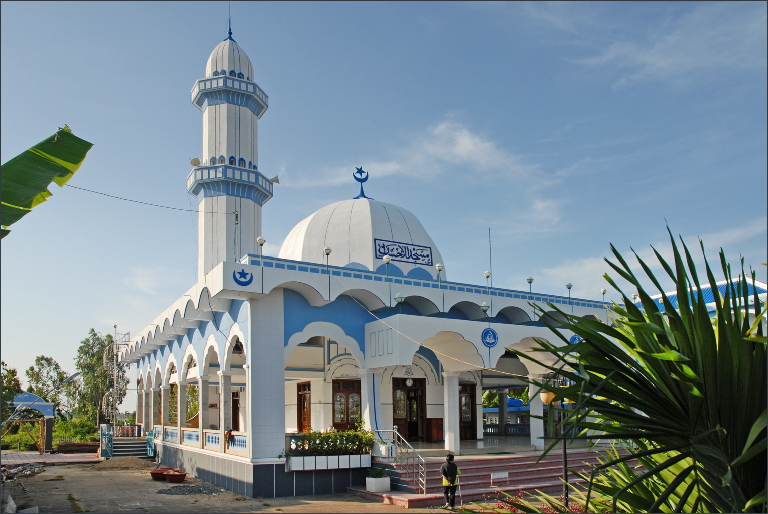 Cette mosquée se trouve dans un village cham sur la rive droite du Bassac en face de Chau Doc Thánh đường Hồi Giáo (Đa Phước, An Phú, An Giang) La construction de la mosquée pourvue d'une salle de prière, d'une école coranique et d'un petit cimetière a été financée par la Malaisie, d'où sont originaires les Chams. Le peuple cham est un groupe ethnique présent au Cambodge et au Viêt Nam (centre et delta du Mékong). Il parle la langue cham (langue austronésienne) et est musulman. Article de Wikipedia